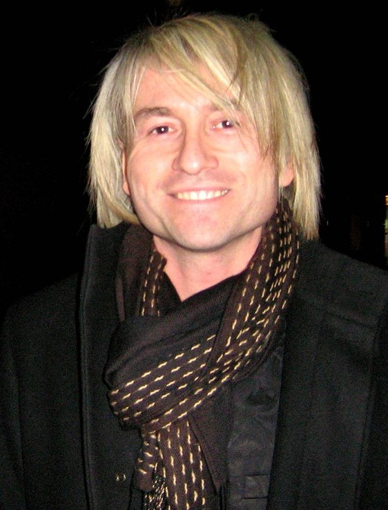 Piotr Rubik (ur. 3 września 1968 w Warszawie) – polski kompozytor muzyki instrumentalnej, filmowej i teatralnej, multiinstrumentalista oraz prezenter telewizyjny a także piosenkarz rockowy.